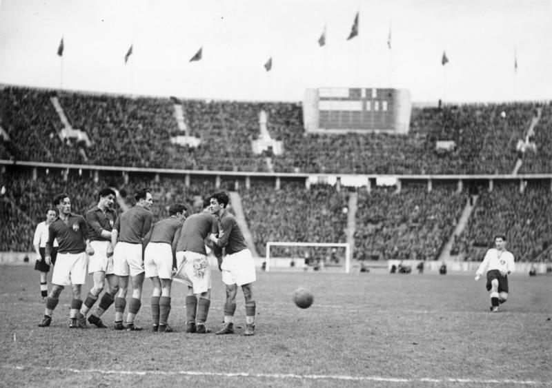 Janes schießt das Ausgleichstor für Deutschland. Ein sportlich sehr interessantes Bild aus dem ersten Fußball-Länderkampf Deutschland-Jugoslawien am Sonntag im Berliner Olympia-Stadion: Mit Zentimetergenauigkeit schießt der deutsche Verteidiger Janes (rechts) einen Strafstoß an der Sperrmauer der gegenerischen Verteidigung vorbei zum zweiten Tor für Deutschland ein, das den Ausgleich brachte. Scherl Bilderdienst, Berlin 26.2.1939